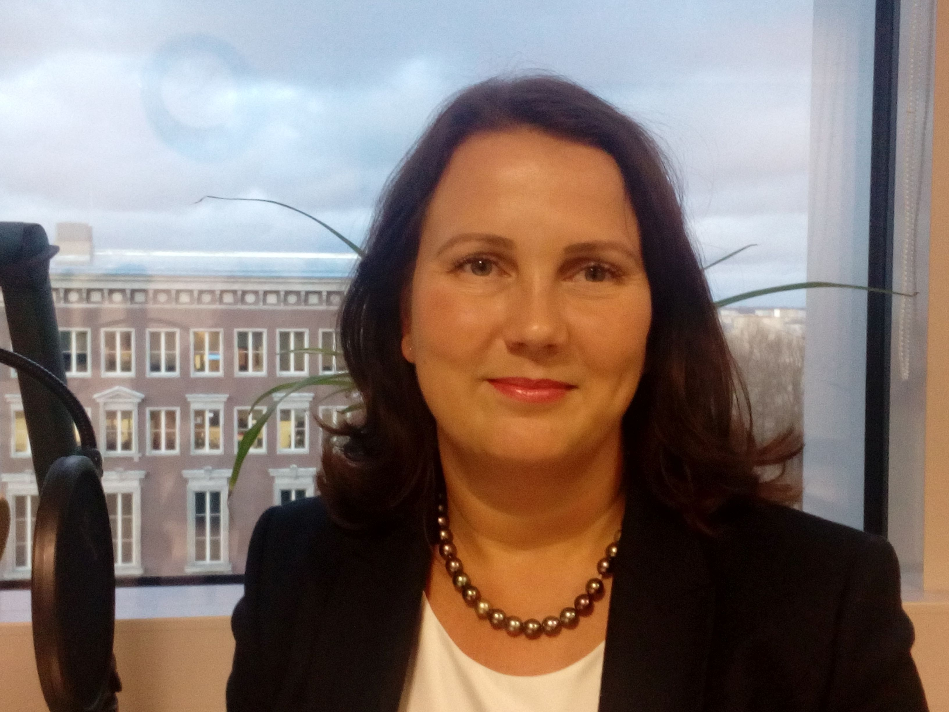 Merike Ristikivi, Tartu Ülikool, õigusteaduskond